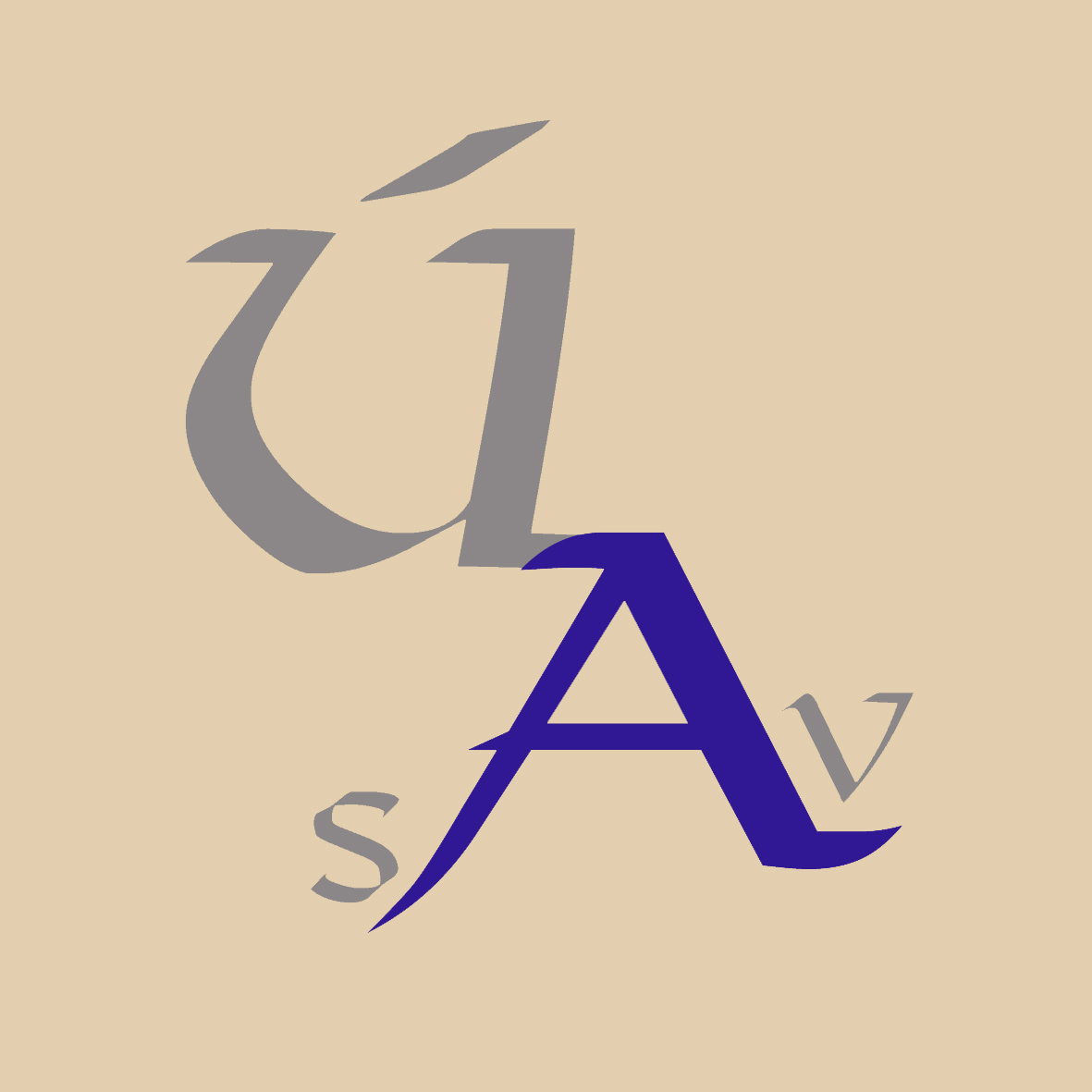 Logo Ústredného archívu SAV